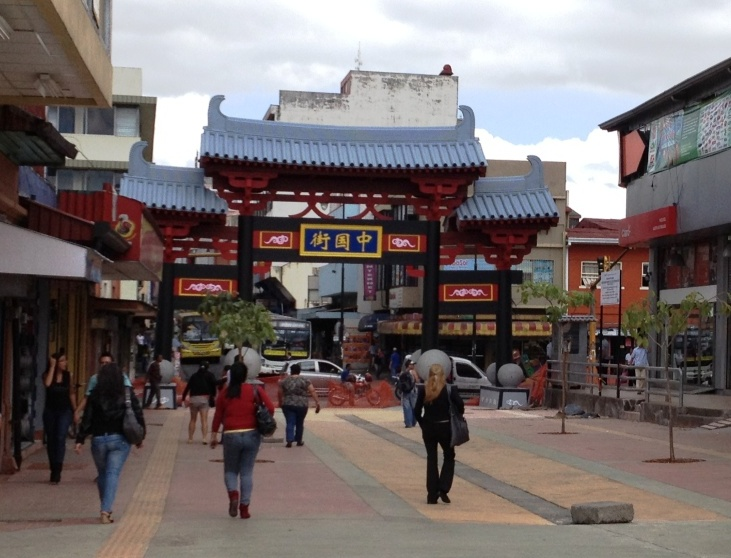 Puerta representativa del la Dinastía Tang con 8 esferas de granito en representación de las esferas de piedra como símbolo de Costa Rica, donadas por la República Popular China, como amistad de ambos pueblos y para ser la puerta de entrada al nuevo Barrio Chino en San José, Costa Rica.